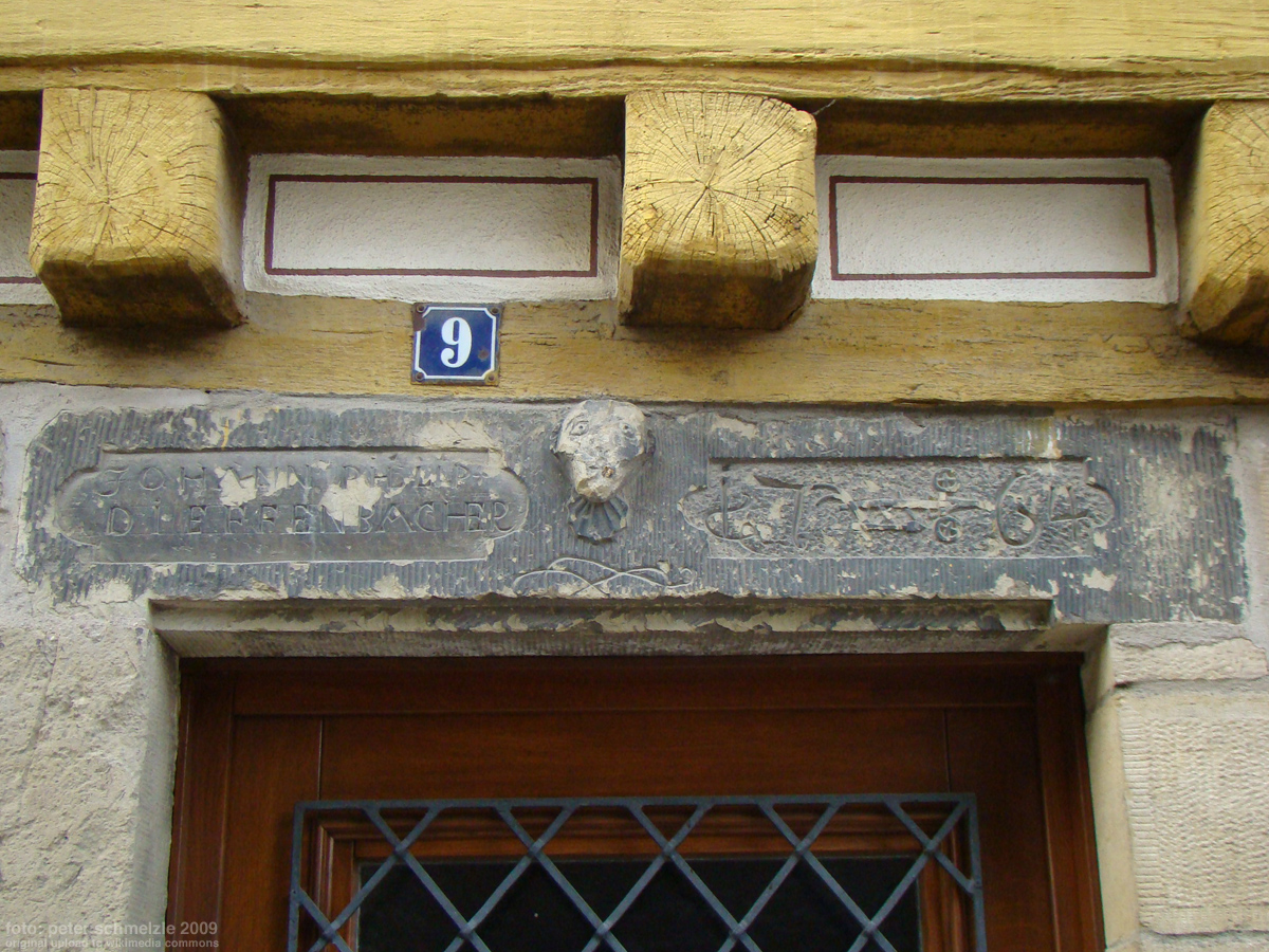 Alemannisches Fachwerkhaus an der Drei-Stil-Ecke in Eppingen, Kettengasse 9